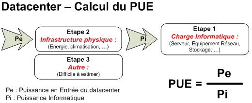 Formule et identification des sous-systèmes entrant dans le calcul du PUE : Power Usage Effectiveness